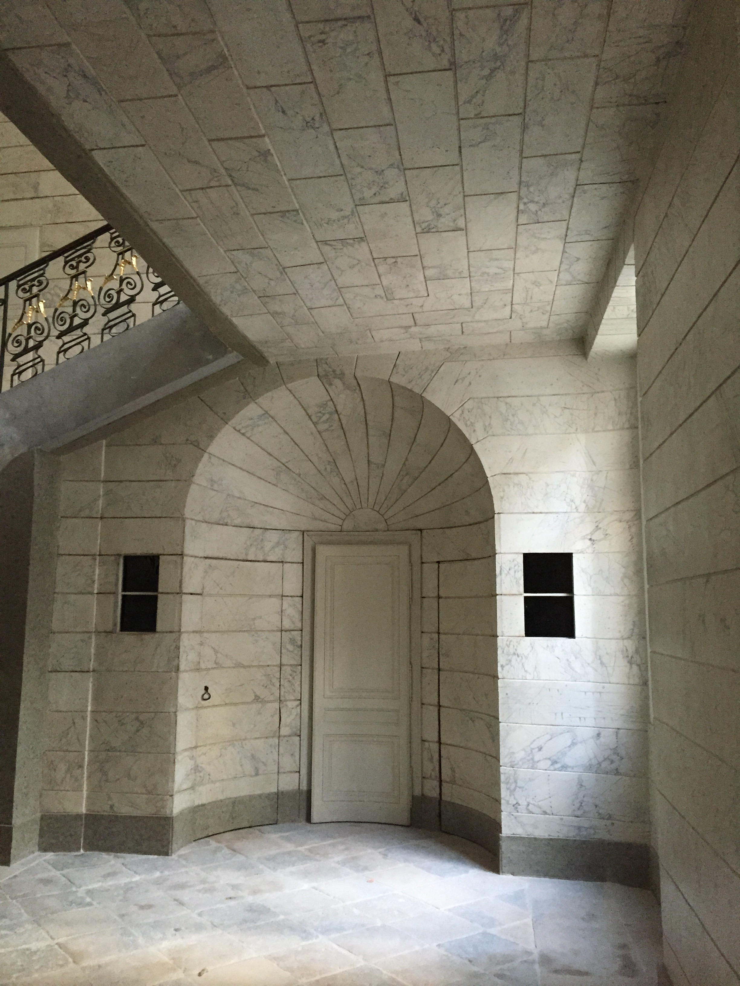 Hall entrée escalier d'honneur